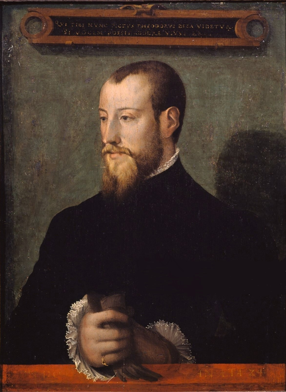 Portrait anonyme de Théodore de Bèze à l'âge de 24 ans, Genève, musée de la Réformation, XVIe siècle.